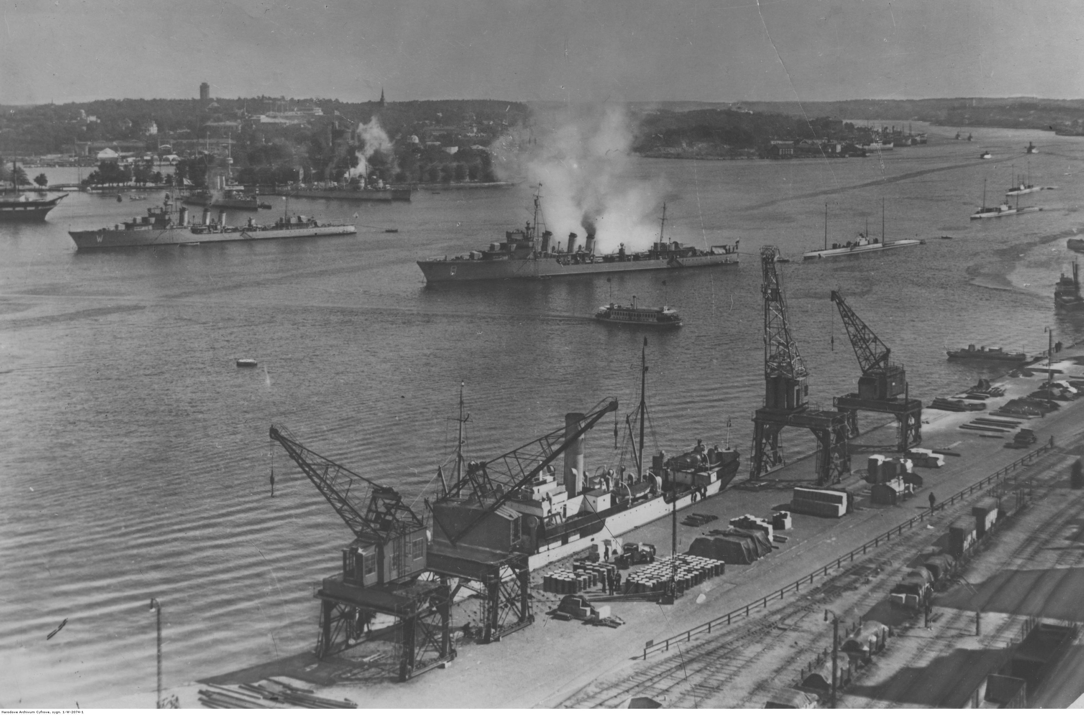 Niszczyciele ORP "Burza" i ORP "Wicher" oraz okręty podwodne ORP "Ryś", ORP "Wilk" i ORP "Żbik" wpływają do portu w Sztokholmie.